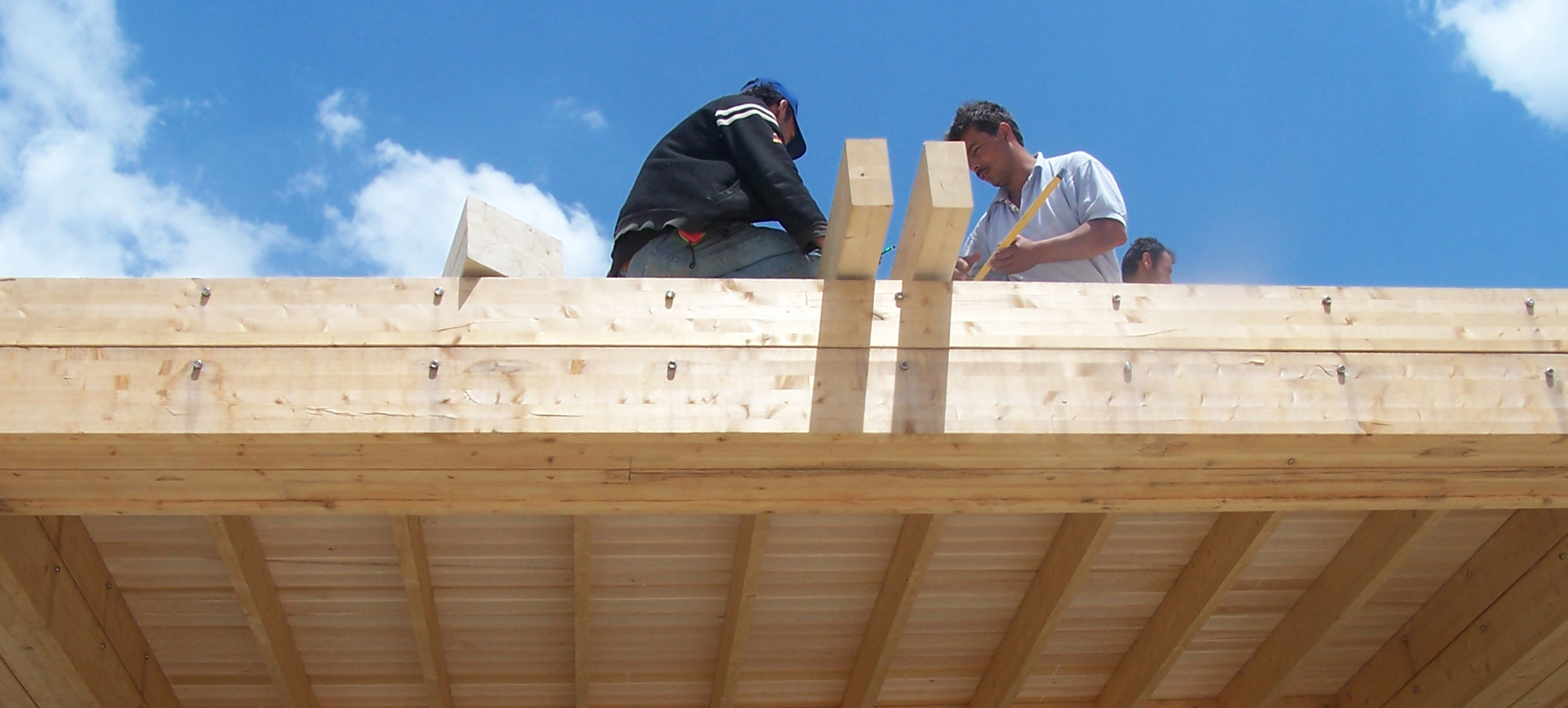 Lamine ahsap bostanci terminal binasi detay